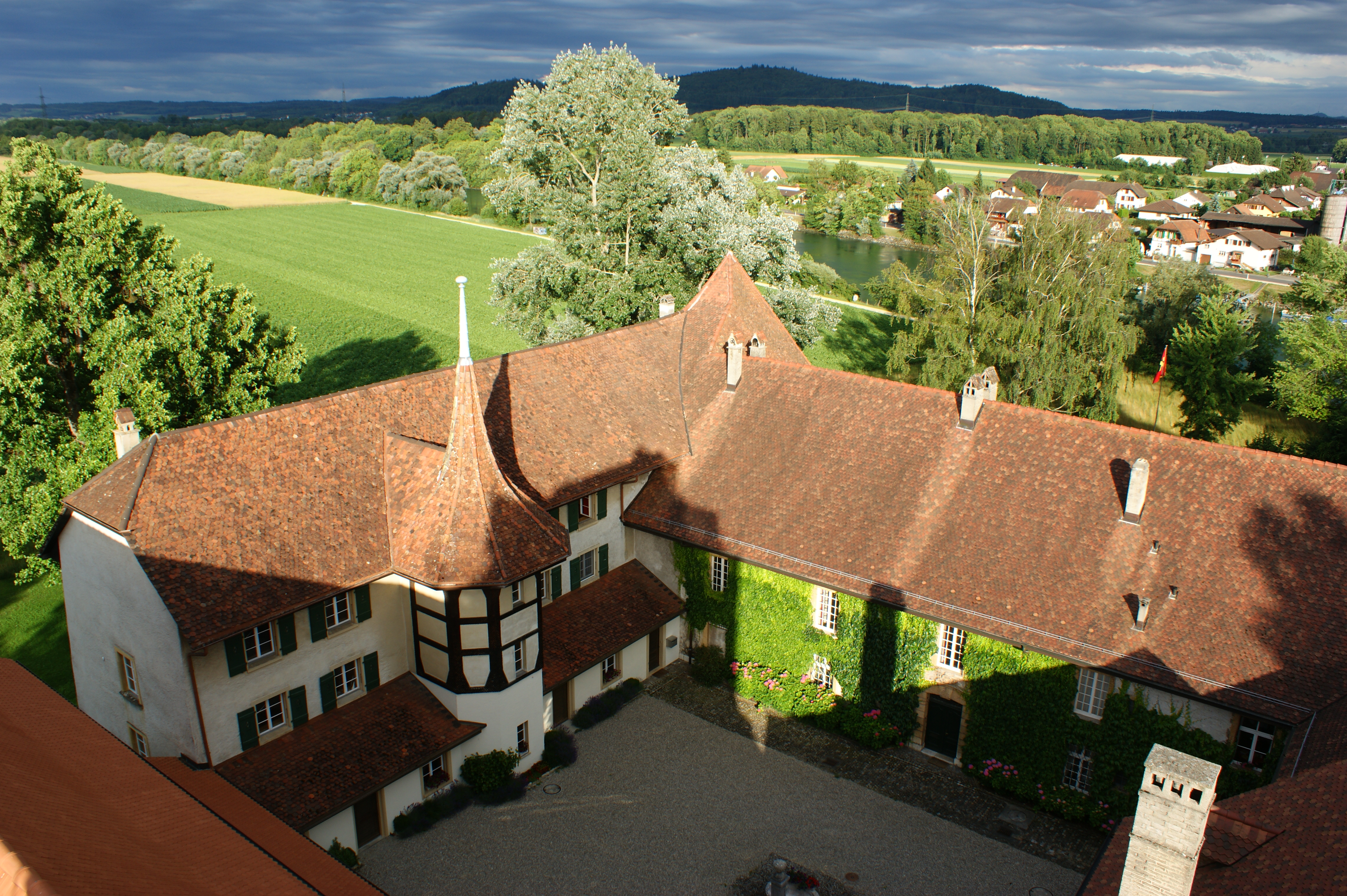 Kloster Gottstatt: Blick vom Kirchturm in den Klosterhof Im linken Teil, das Kirchgemeindehaus der Kirchgemeinde Gottstatt, die aus den drei politischen Gemeinden Orpund, Safnern und Scheuren besteht, Der rechte Teil ist im Privatbesitz